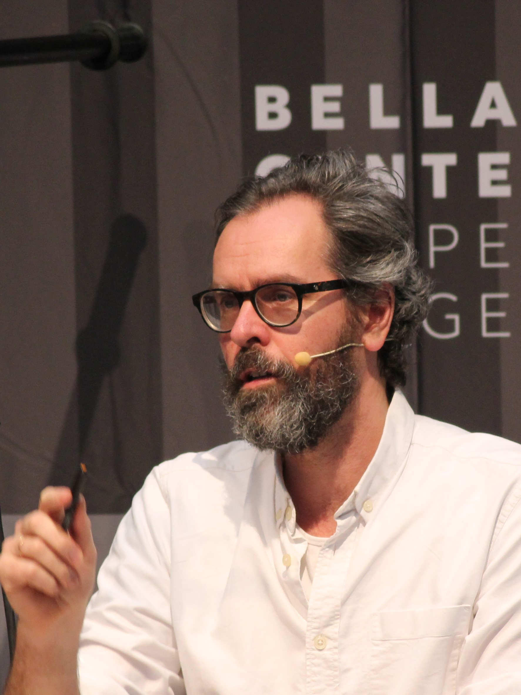 Anders Morgenthaler på Bogforum 2019.